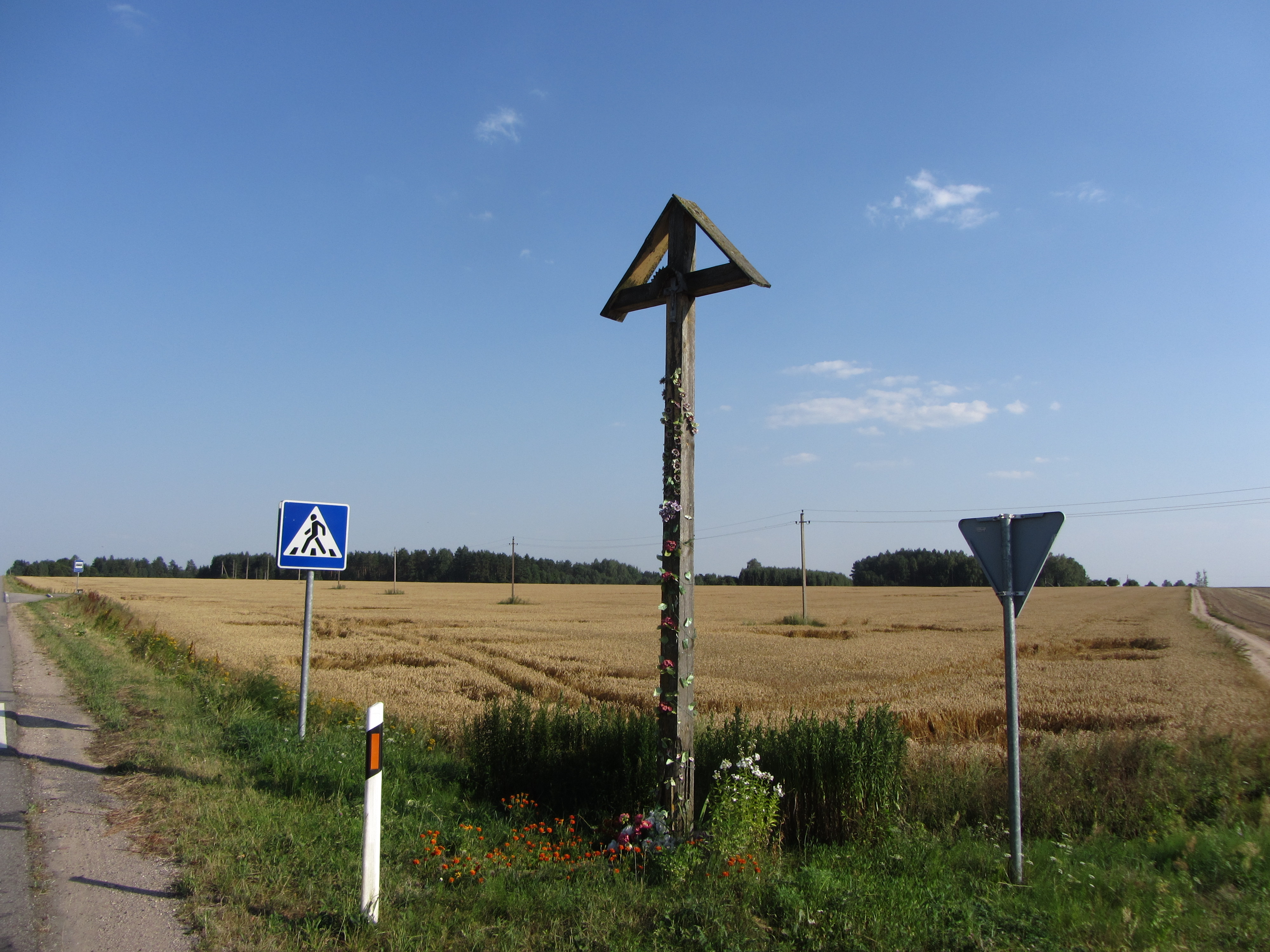 Gerviškių sen., Lithuania